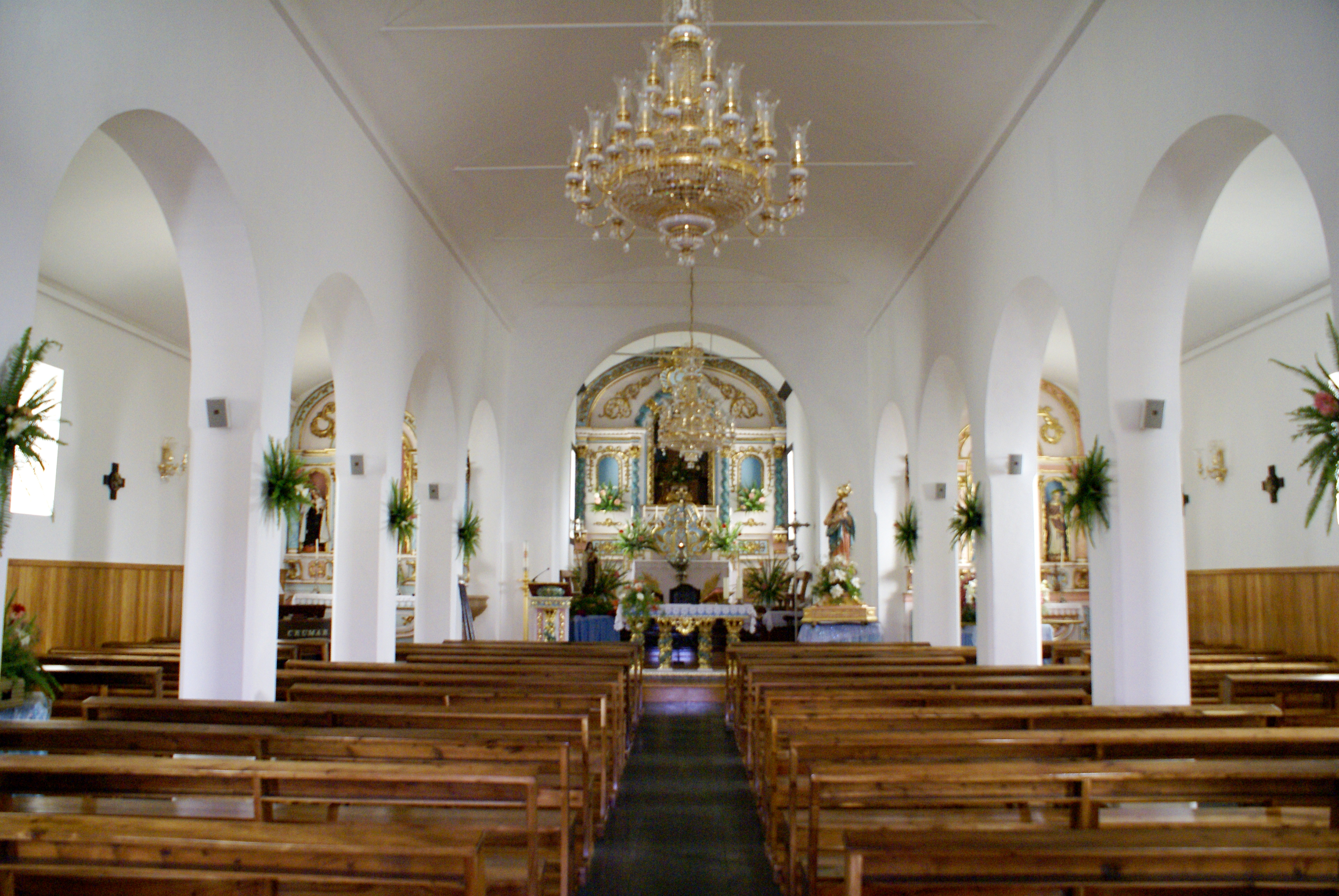 Igreja da Nossa Senhora do Rosário, interior, Rosais, Velas, ilha de São Jorge, Açores, Portugal